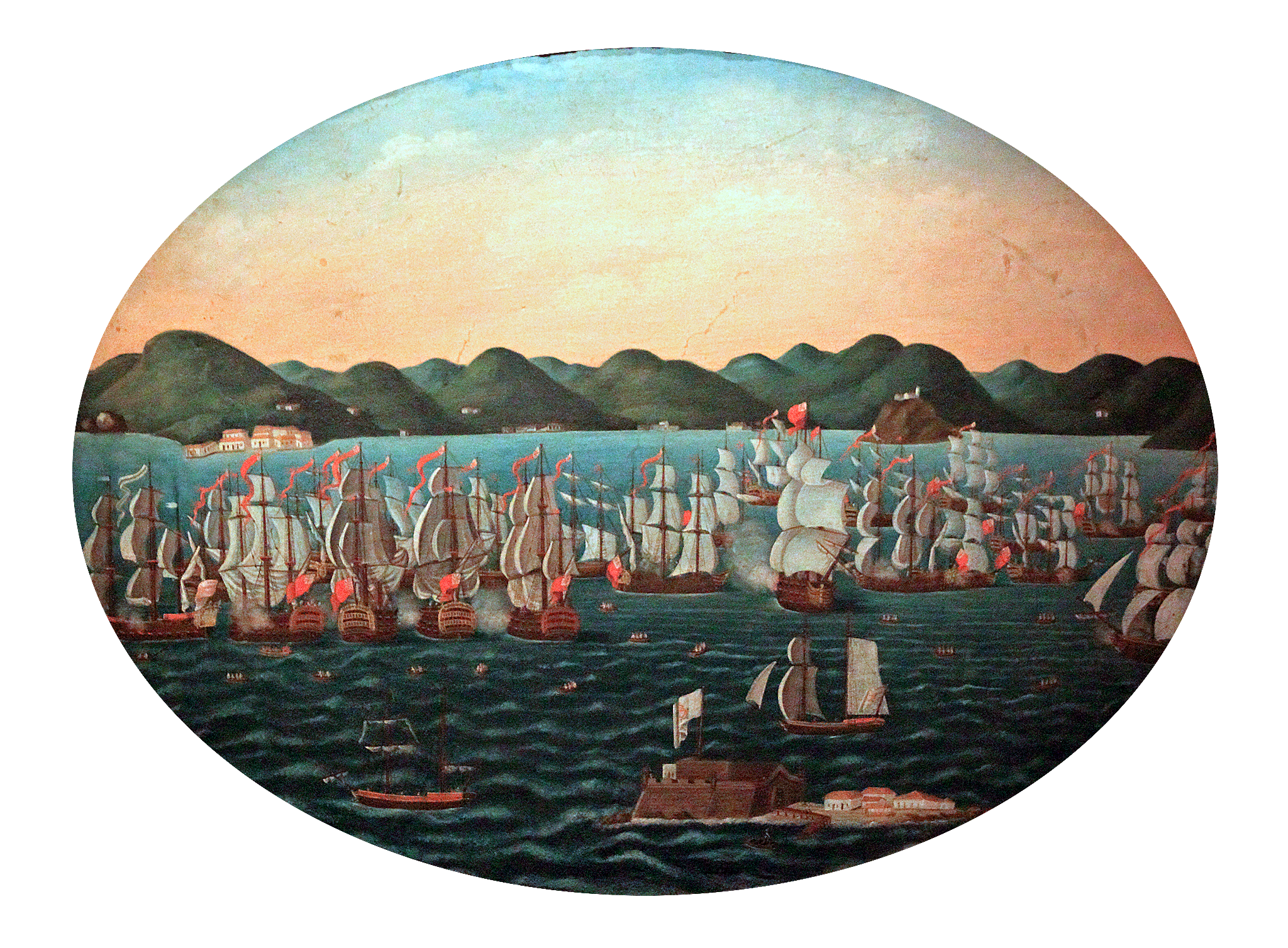 Representa a frota mercante inglesa fundeada diante da Fortaleza de Villegaignon. No segundo plano, o litoral de Niterói, RJ: ponta da armação, praia grande, fortaleza de Gragoatá, ilha da Boa Viagem, com sua igreja, e a praia de Jurujuba.